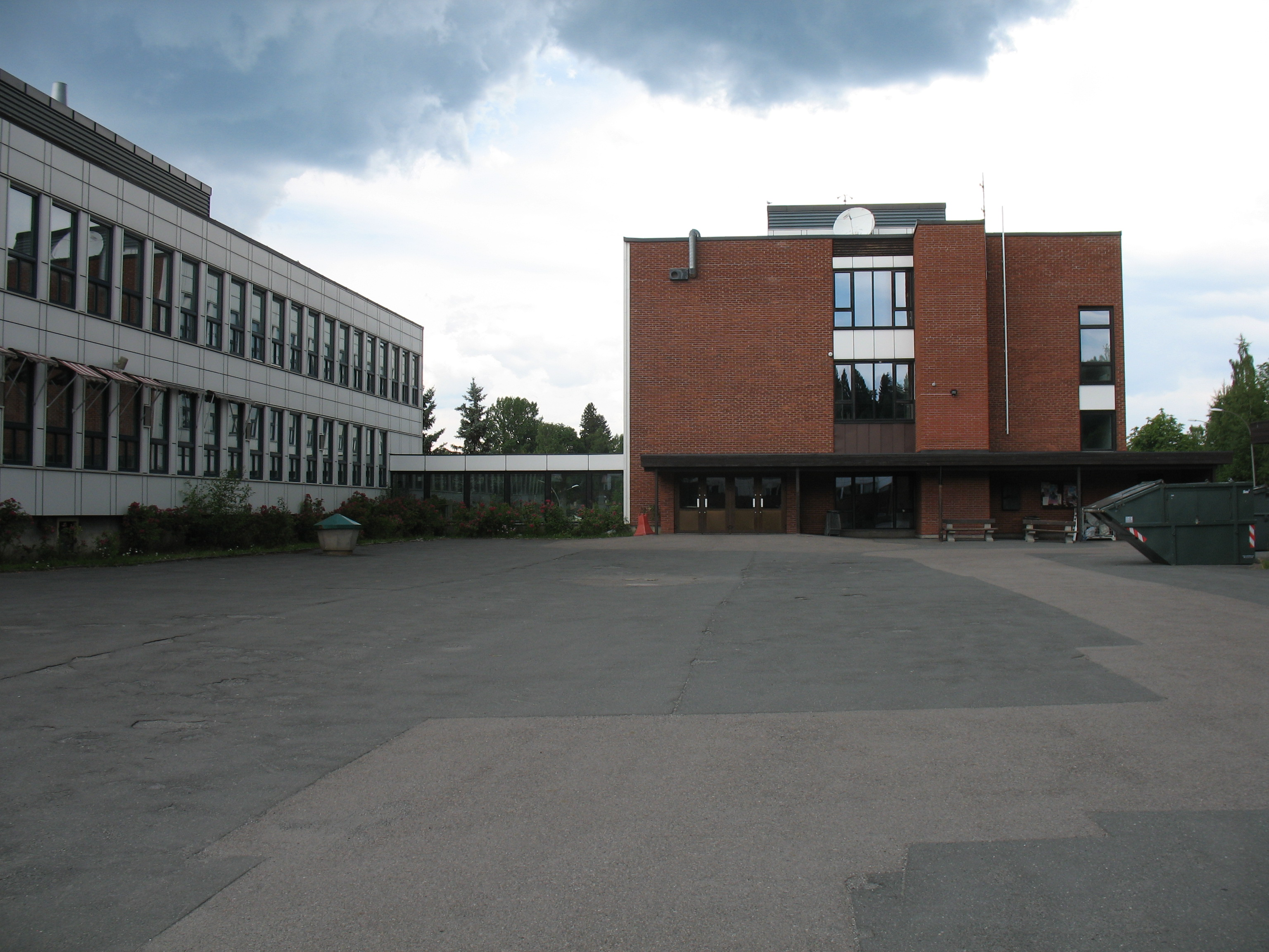 Ulsrud videregående skole, Oslo